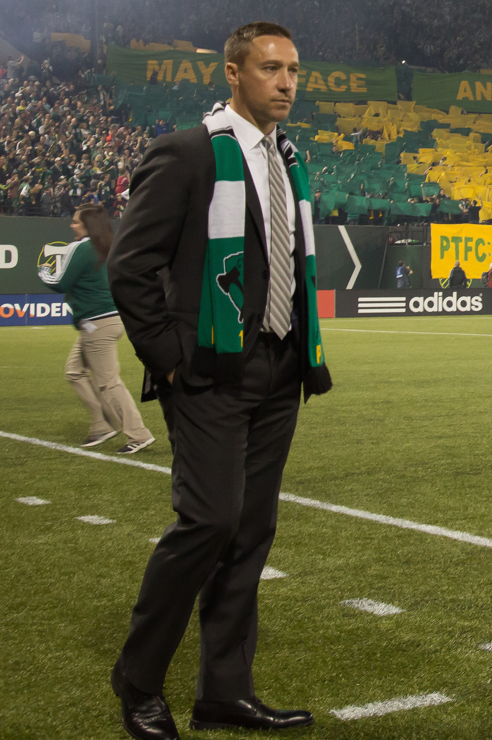 N42A1001